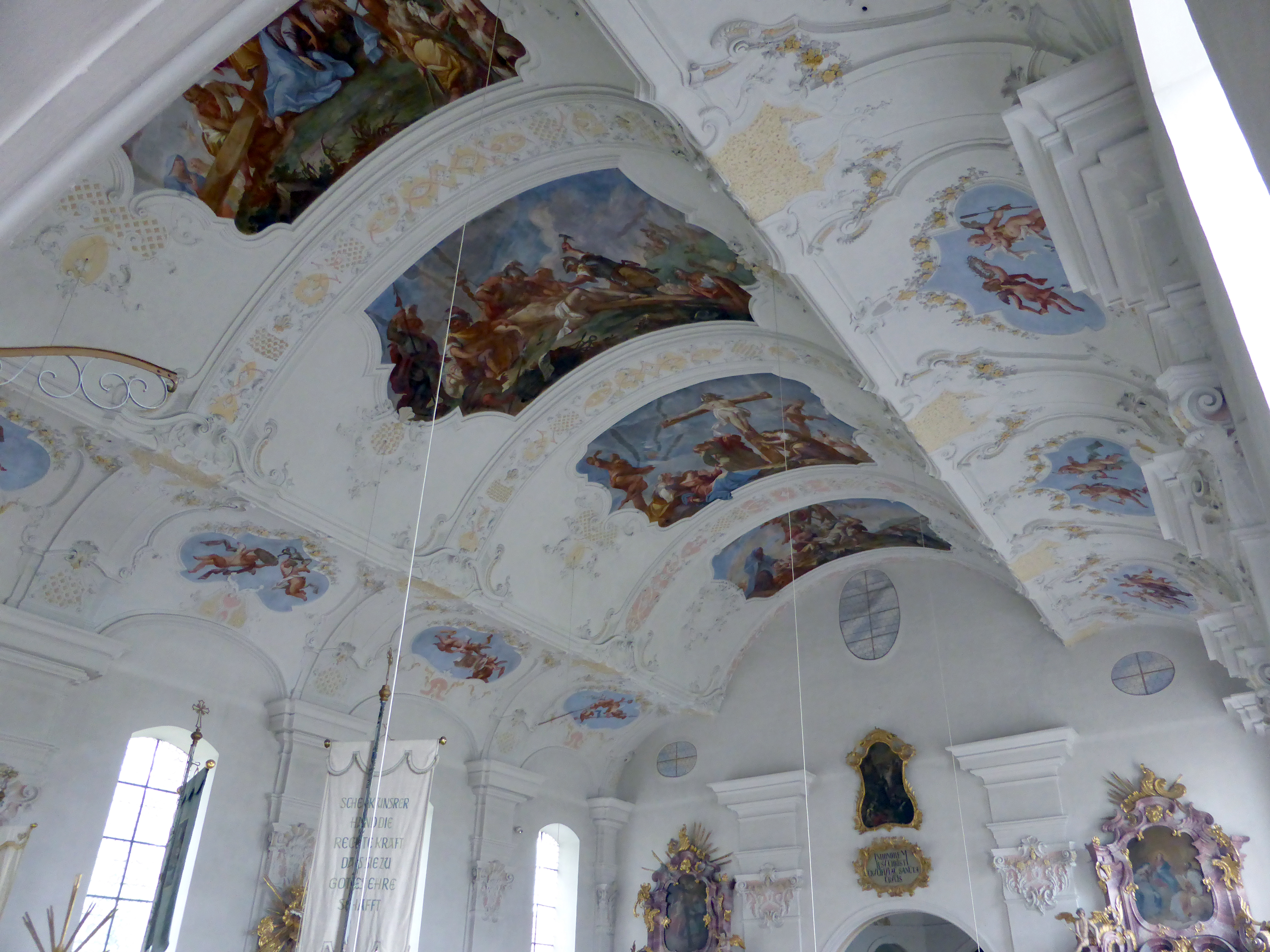 Wikipedia:Süddeutschland-Treffen im Mai 2016 in Kempten (Allgäu). Kloster Heiligkreuz - Deckenfresken.